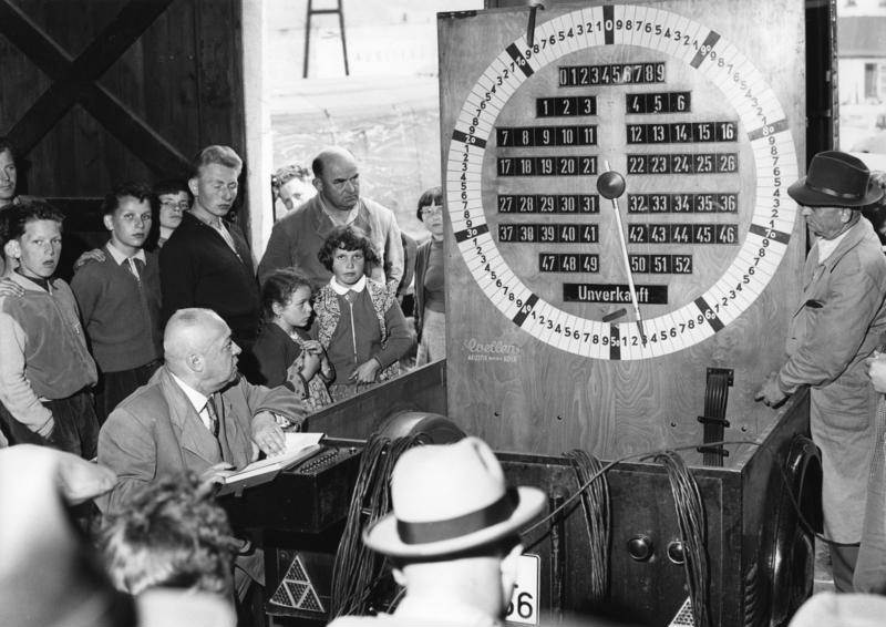 Kirschversteigerung an der Mosel, 25.6.57